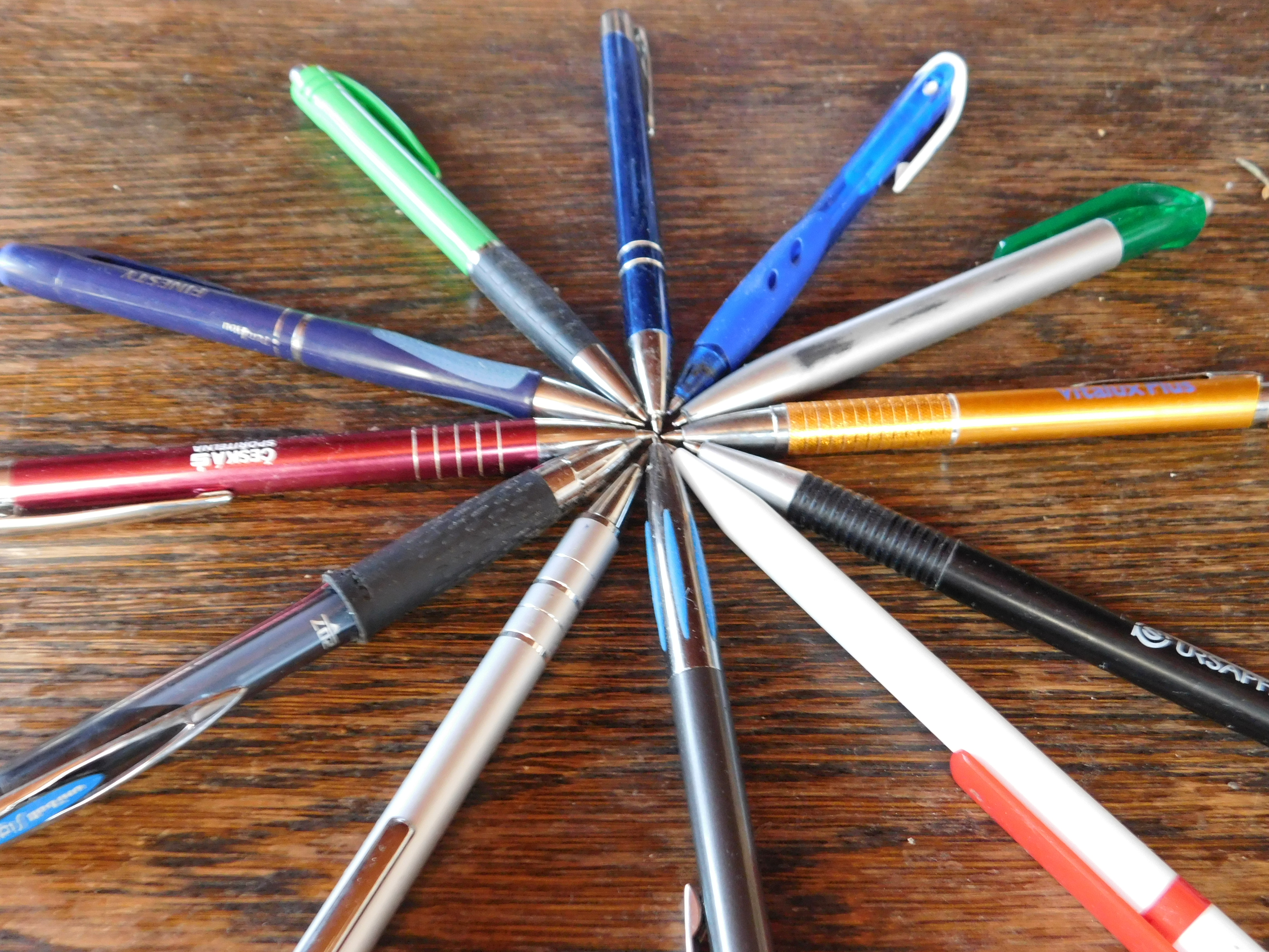 Různé druhy propisek